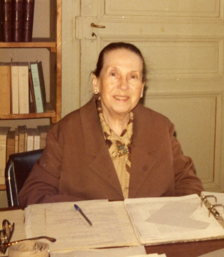 portrait